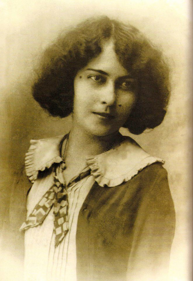 Primera Dama de Puerto Rico